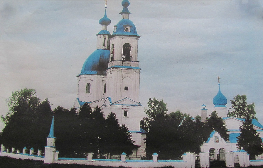 Фото/рисунок церкови Успения Пресвятой Богородицы в Кулеберьево (Комсомольский р-он, Ивановской области)